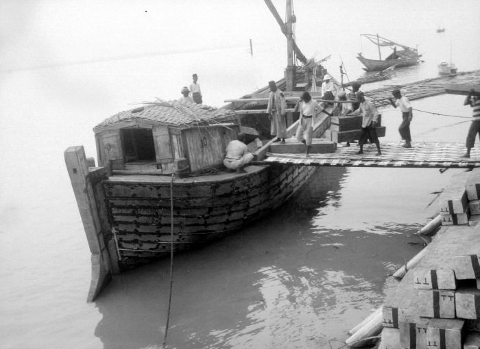 Negatief. Djati wordt aan boord gebracht op de rede van Grissee om verscheept te worden naar Zuid-Afrika